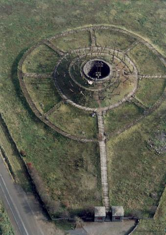 Muhi - Memorial park, Hungary, aerialphotography